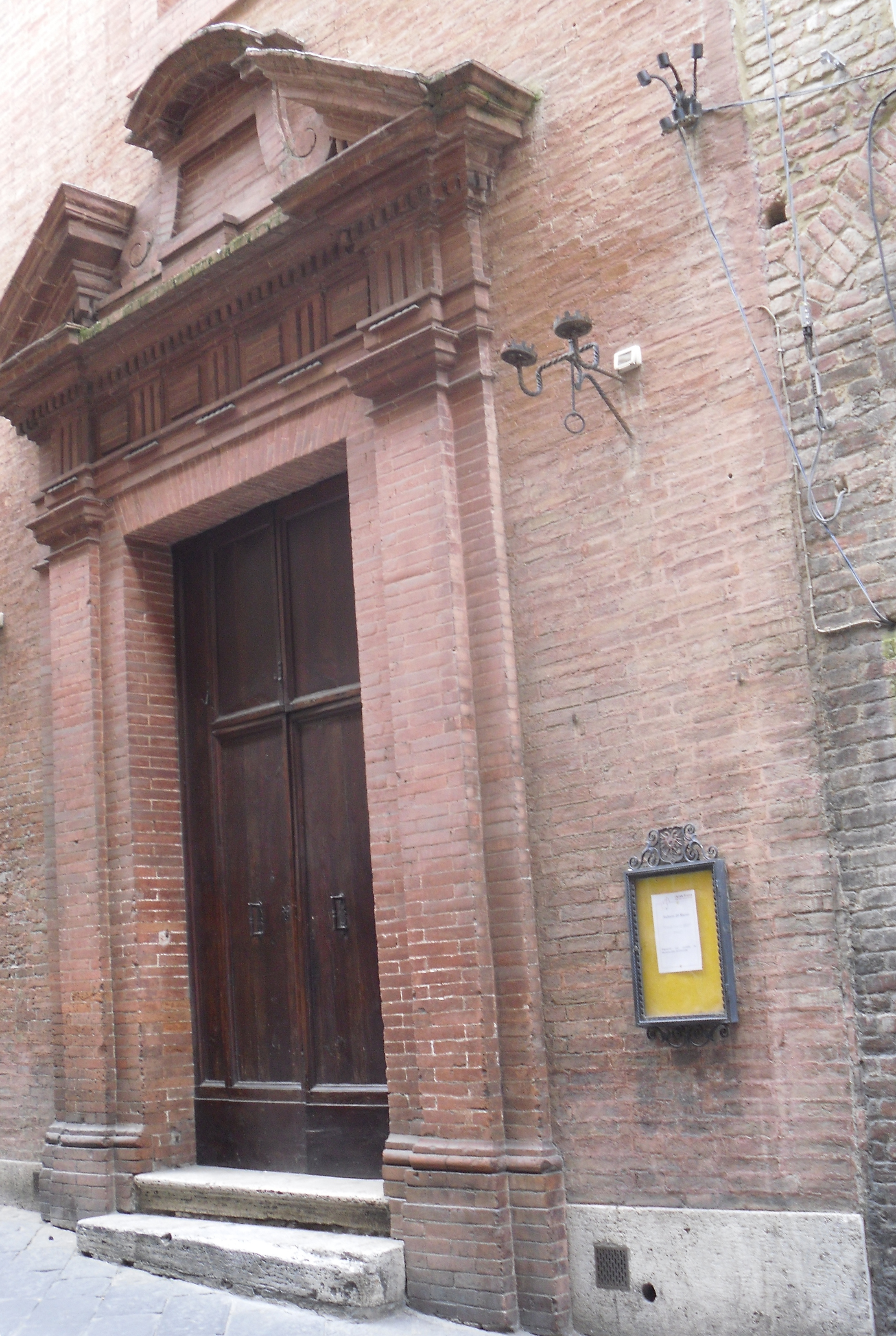 Sede storico-museale della Nobile Contrada dell'Aquila, in via del Casato di Sotto, a Siena.